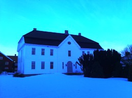 Møglestu husmorskole. Hovedbyggning